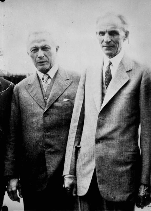 Junkers verklagt Ford! Der deutsche Flugzeugconstrukteur Prof. [Hugo] Junkers (links) hat gegen den amerikanischen Automobilkönig Henry Ford (rechts) einen Prozess wegen Verletzung dreier ihm geschützter Ideen betreffend: den freitragenden Eindecker, den Wellblechrumpf und den Tragflügeln mit Wellblrechdecke, angestrengt.